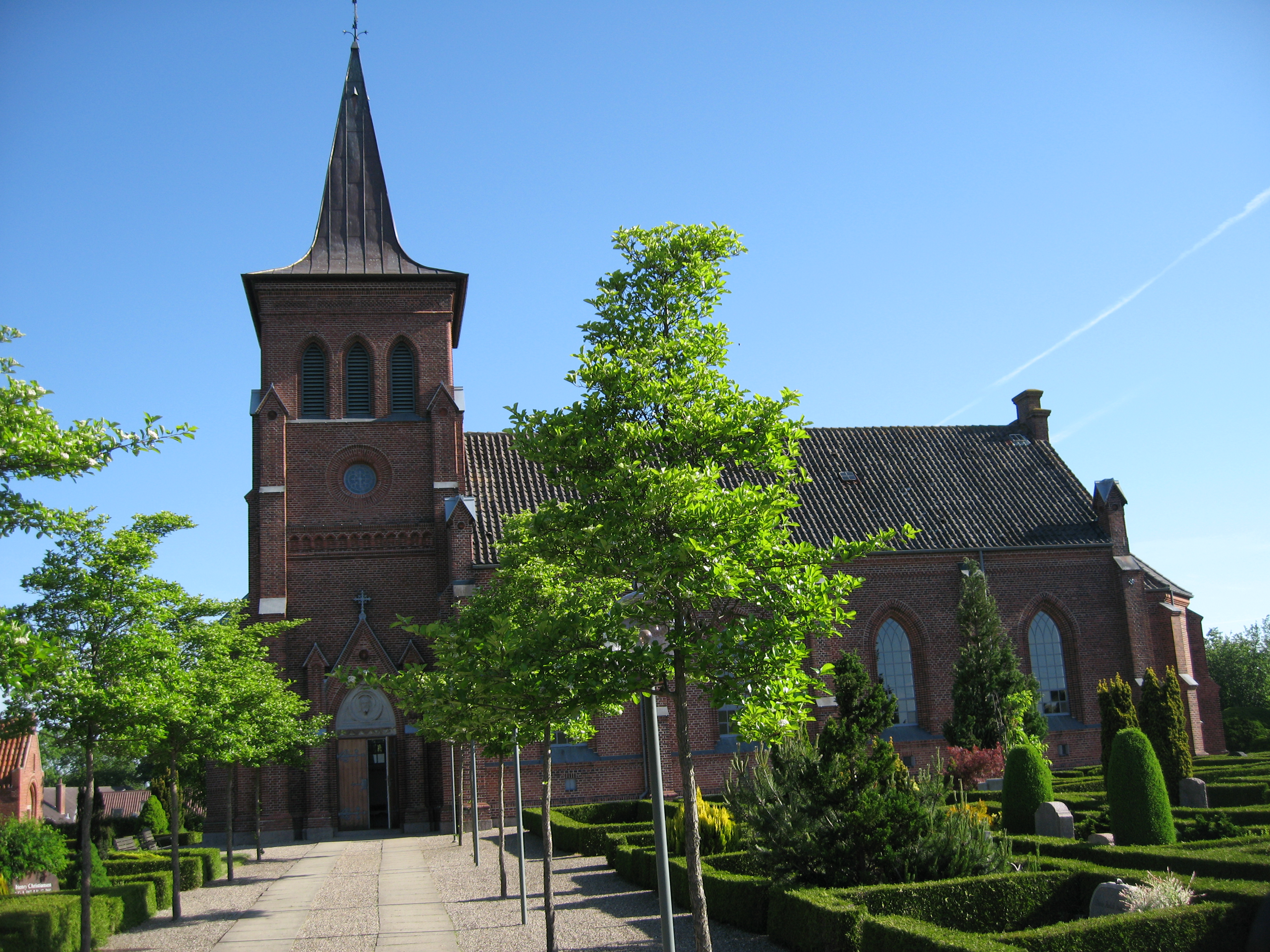 Serridslev Kirke, Horsens Kommune, Region Midtjylland